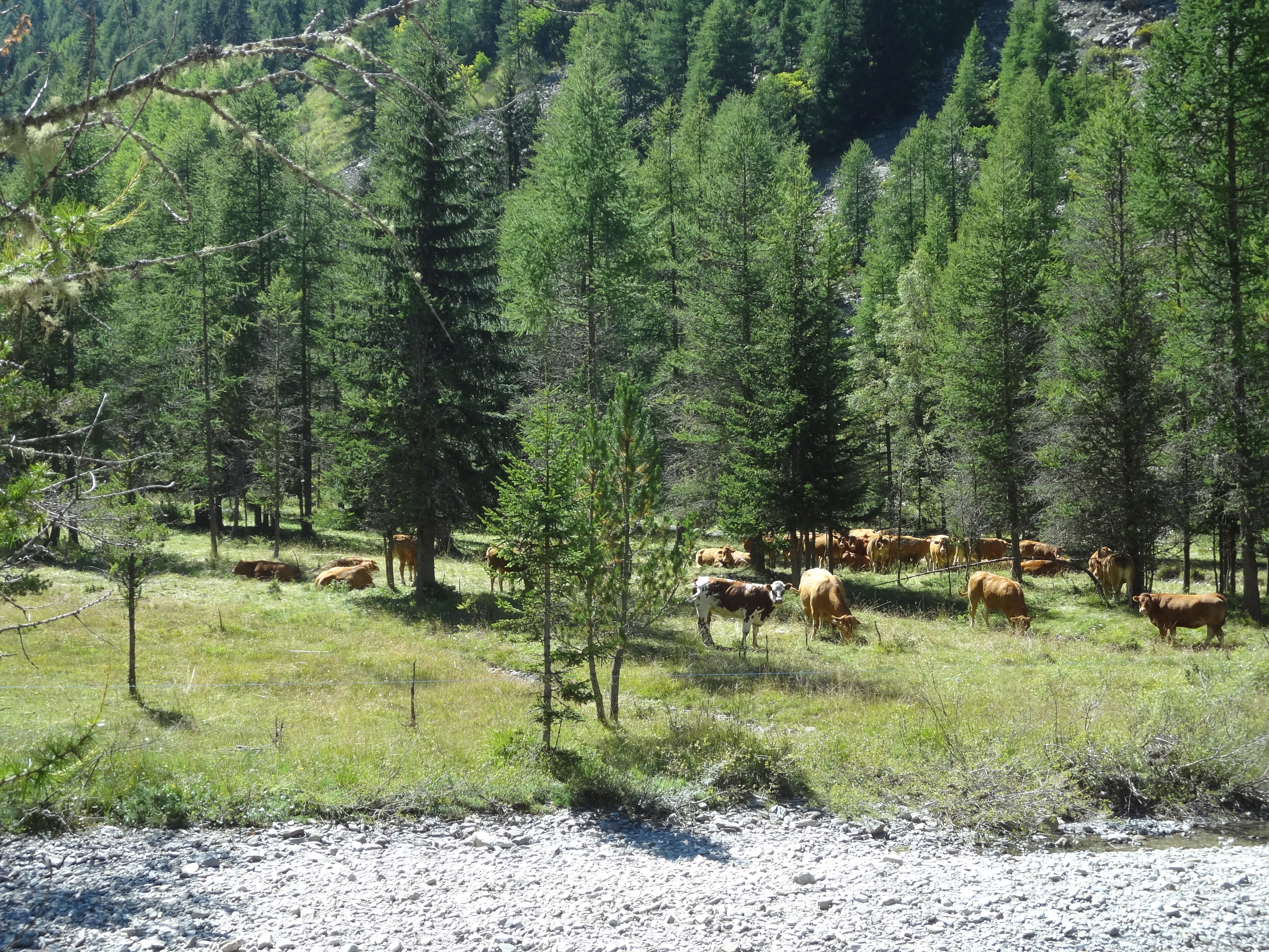 Vaches paissant sous les arbres dans le vallon de Laverq, commune de Méolans-Revel (Alpes-de-Haute-Provence).